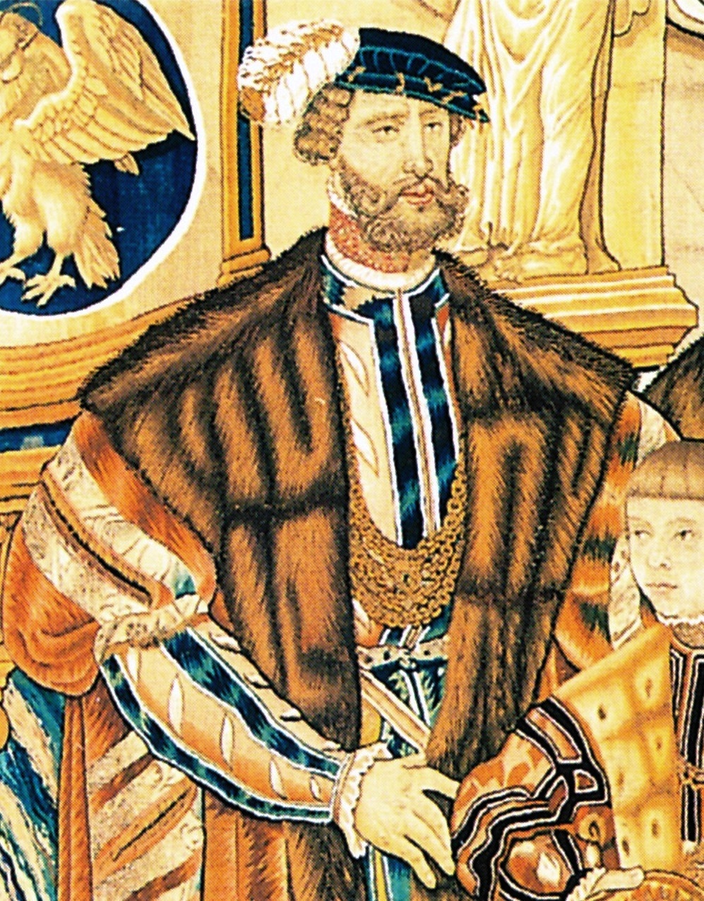 Wirkerei von Herzog Gerog I. von Pommern, Ausschnitt aus dem Croy-Teppich